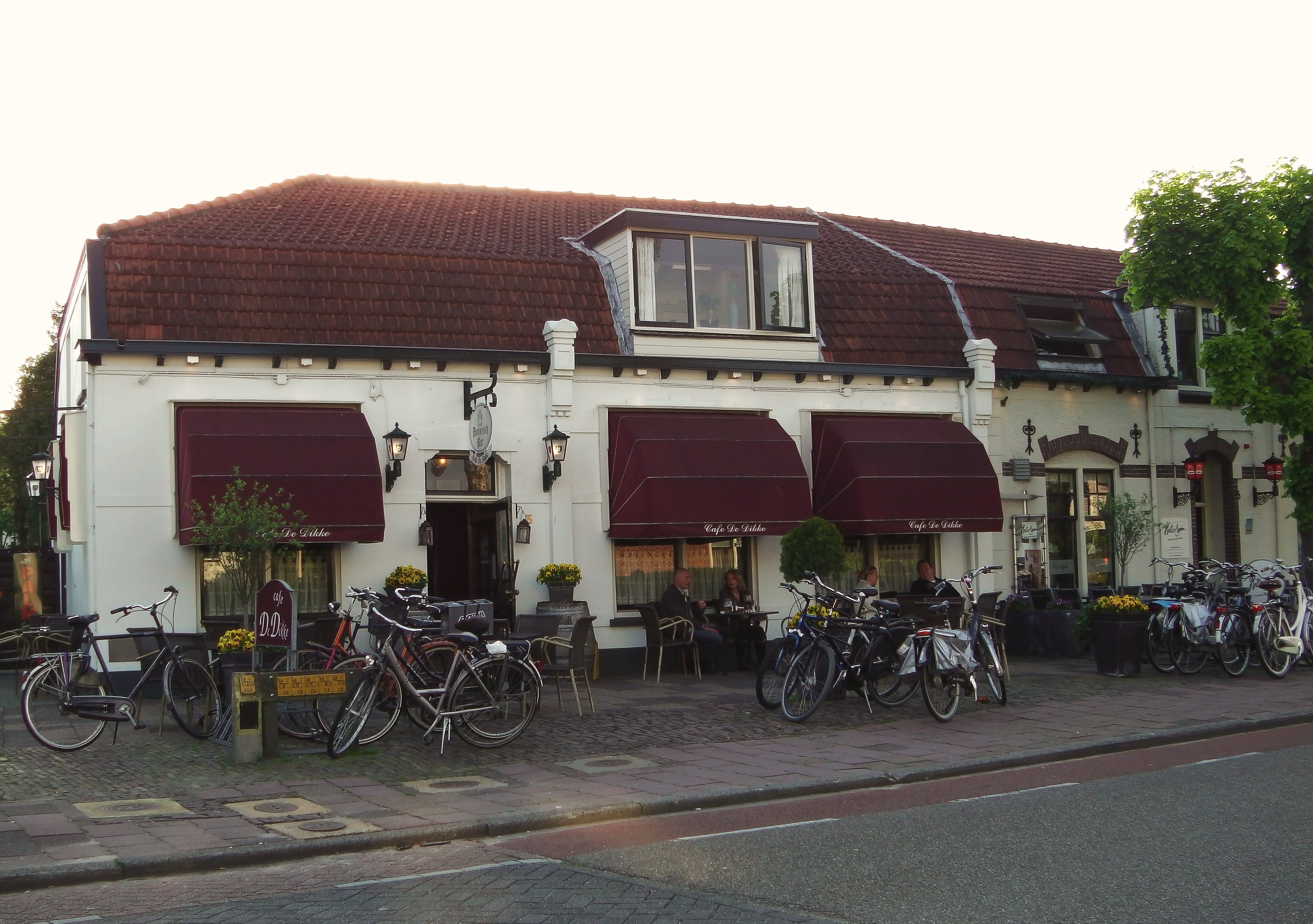 Oud pand uit 1910 gelegen in het centrum van Leusden, aan de Zwarteweg vlakbij winkelcentrum de Biezenkamp. Het pand is gelegen in de wijk Hamersveld-Oud.